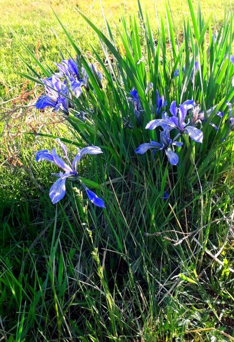 Siberian Iris. Eastern Siberia